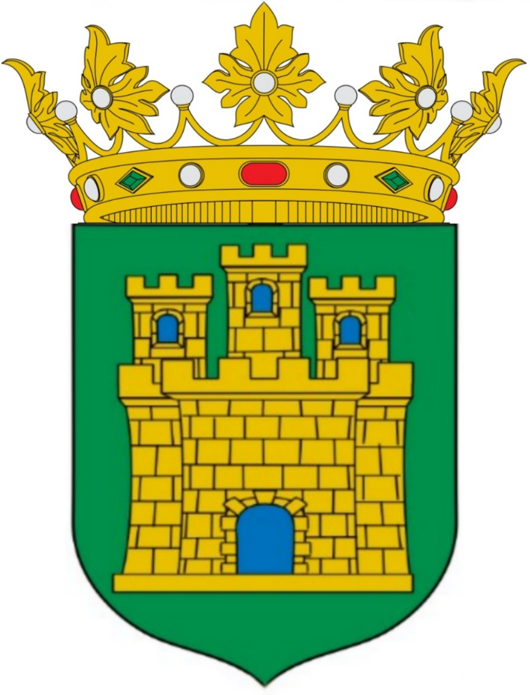 Escudo de Rada con castillo de oro centrado en campo de sinople y timbrado con corona ducal